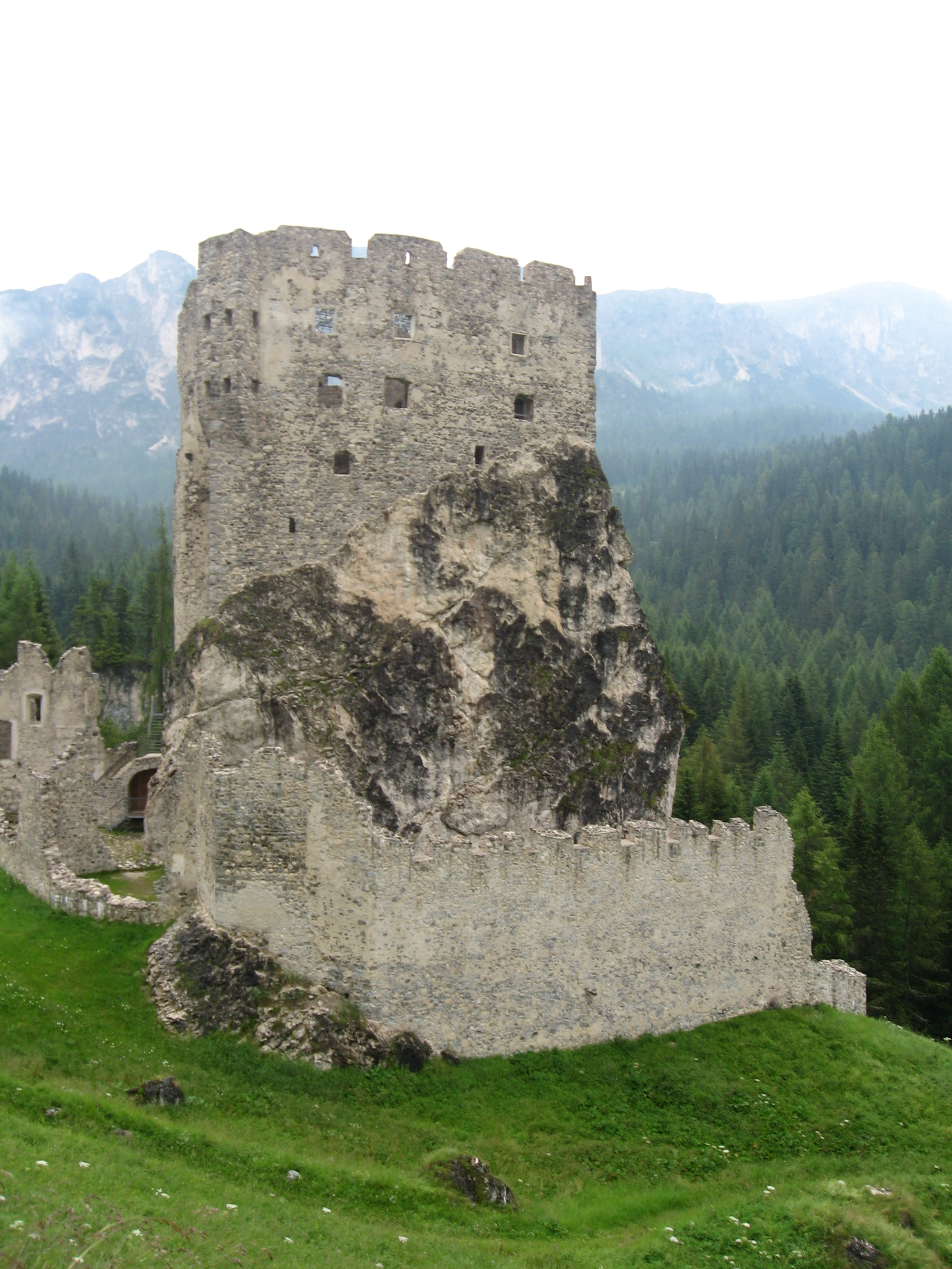 Il castello di Andraz visto da sud.